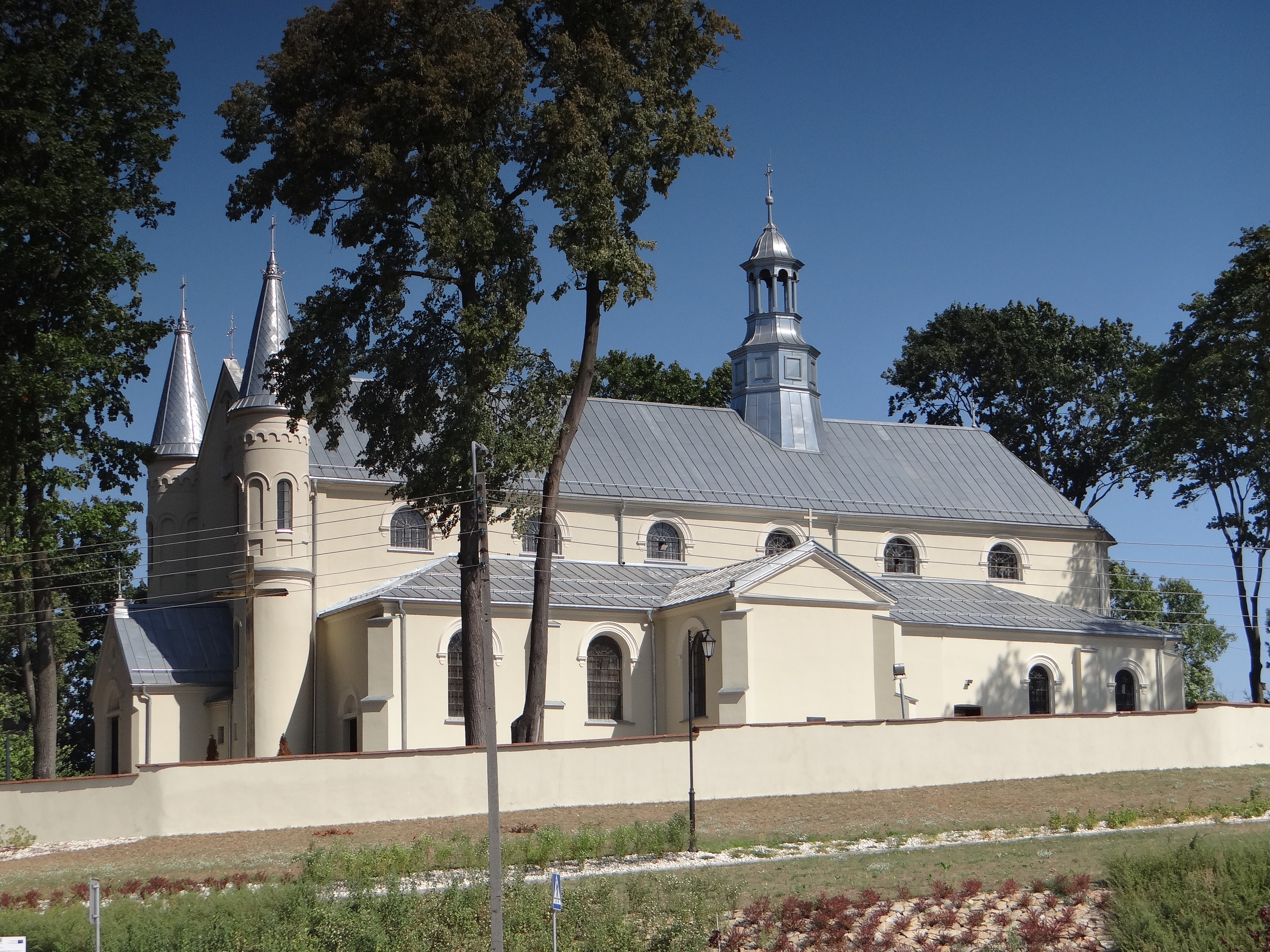 Saint Michael Archangel church in Daleszyce